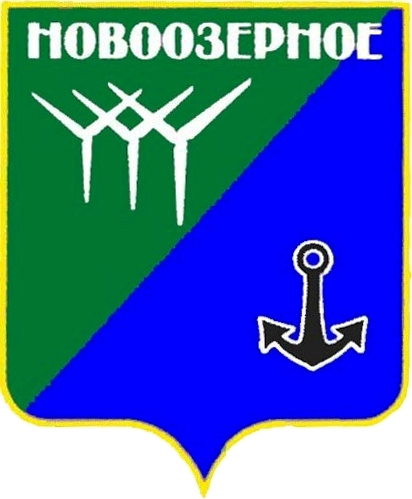 Герб смт Новоозерне